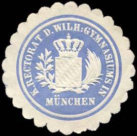 Sealing stamp Title: Königliche Rectorat des Wilhelm - Gymnasiums in München Description: hellblau, weiß, geprägt Place: München size: 4 cm